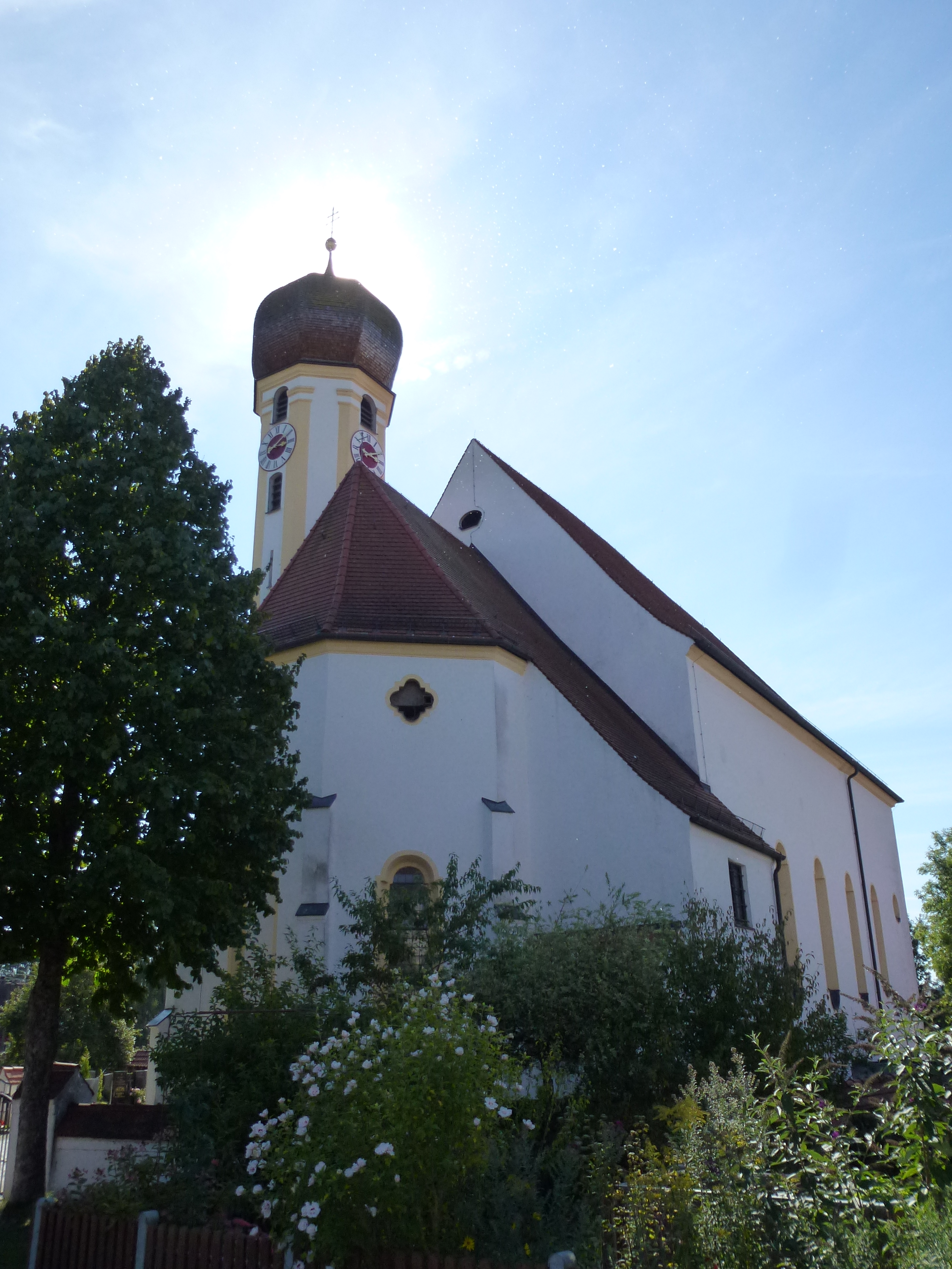 Hilgertshausen, Kirchgasse 5: Katholische Pfarrkirche St. Stephan. Ansicht von WNW